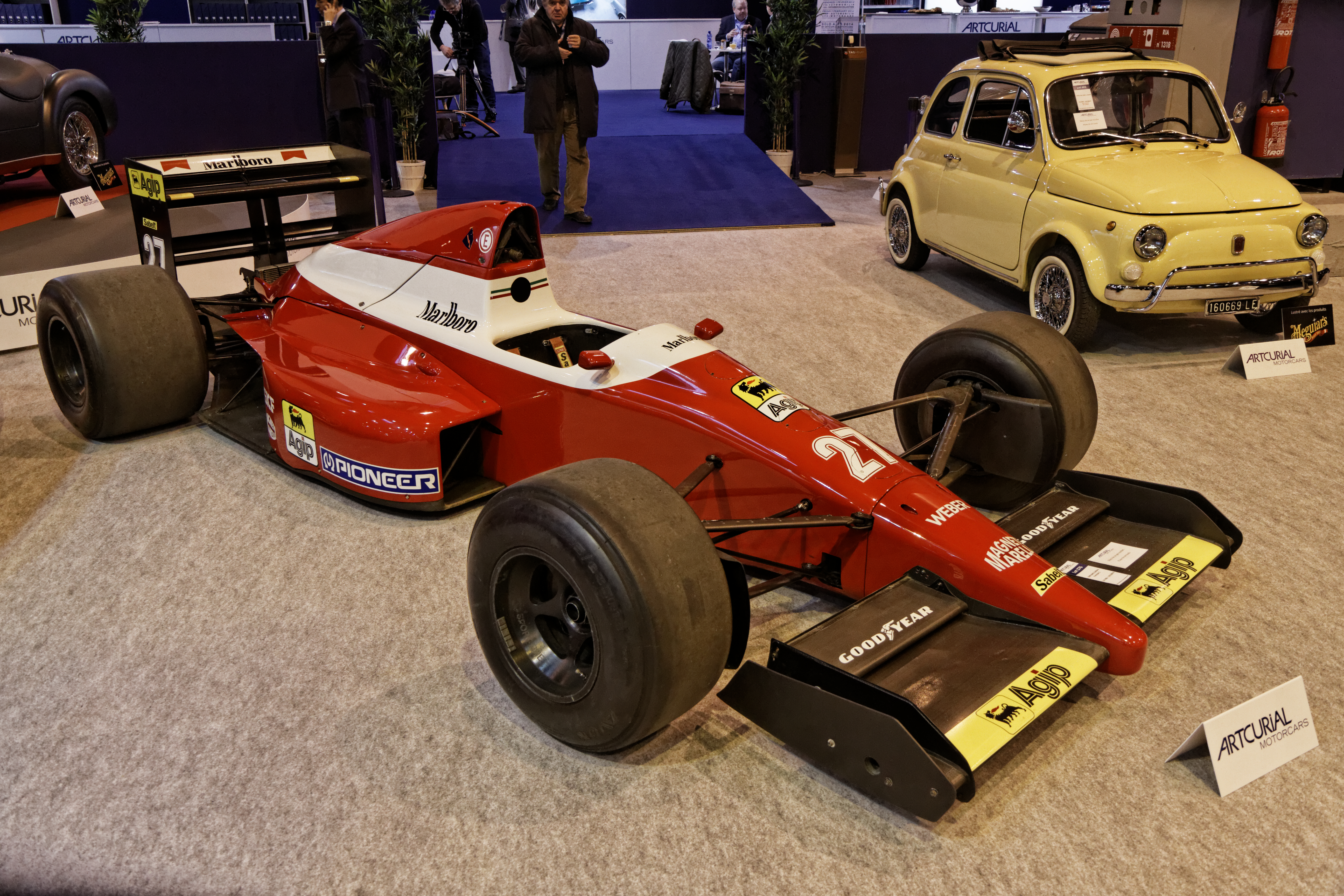 Une BMS Dallara Formule 1 exposée lors du salon Retromobile 2014